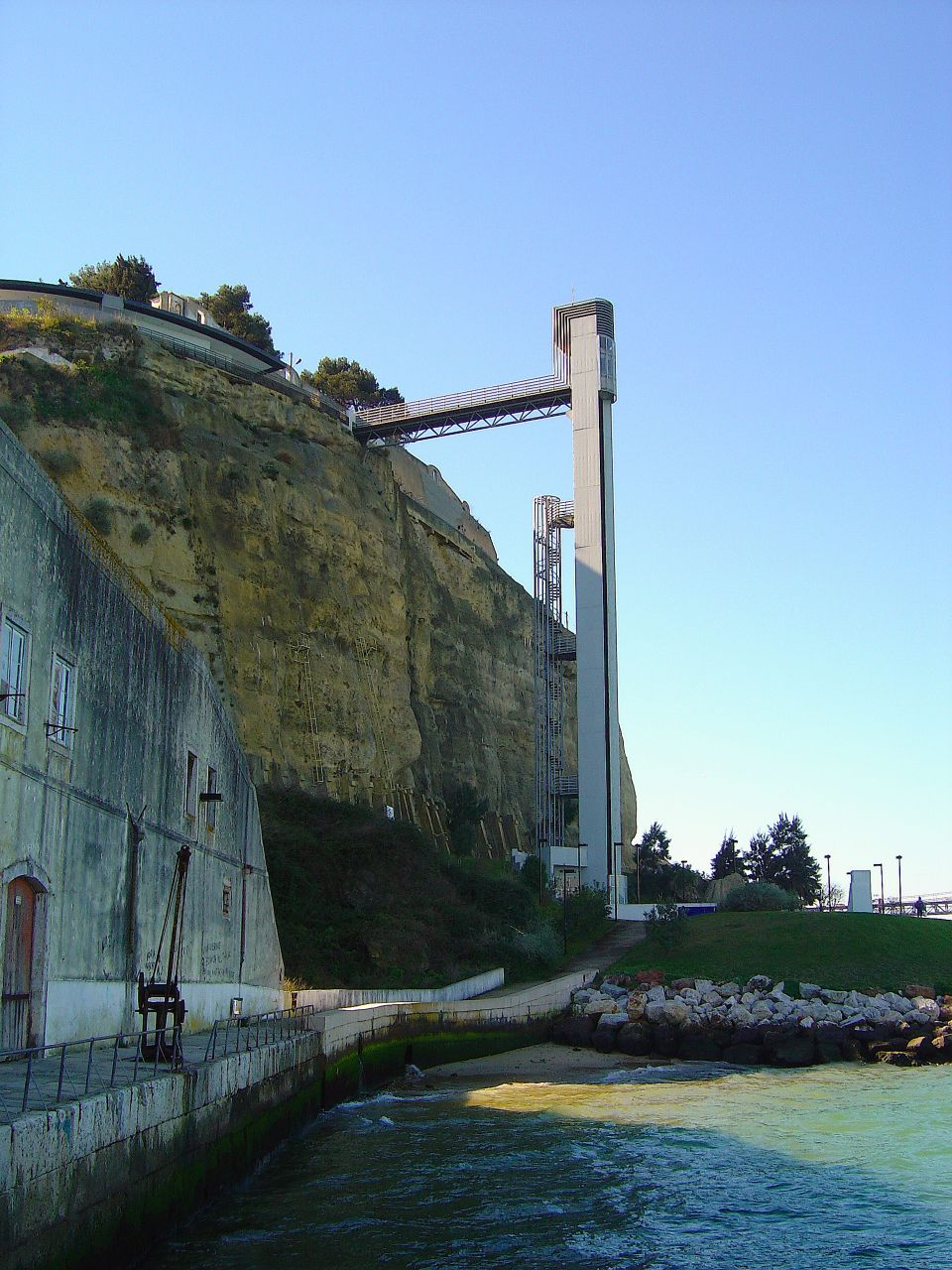 Miradouro da Boca do Vento - Almada